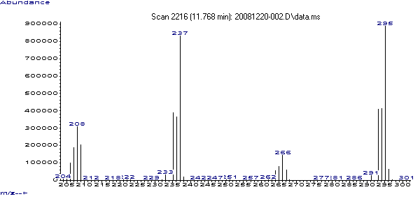 Spettrometro di Massa Agilent Tecnologies 5973, spettro di massa del Piombo tetraetile